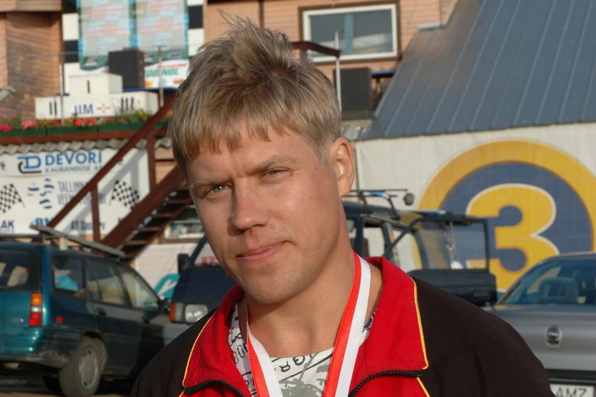 Maailmameister veemotos Aleksei Noskov